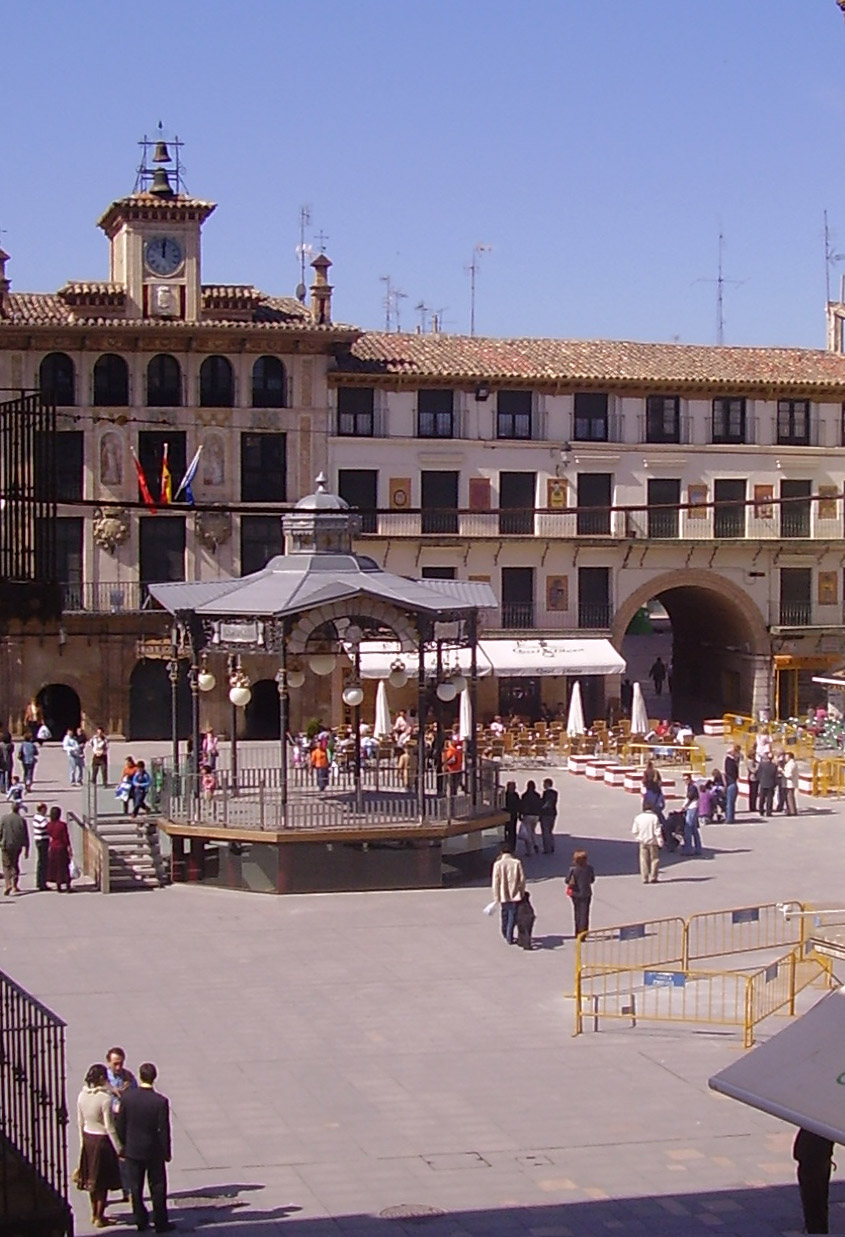 Tudela, Navarra/Navarre, España/Spain